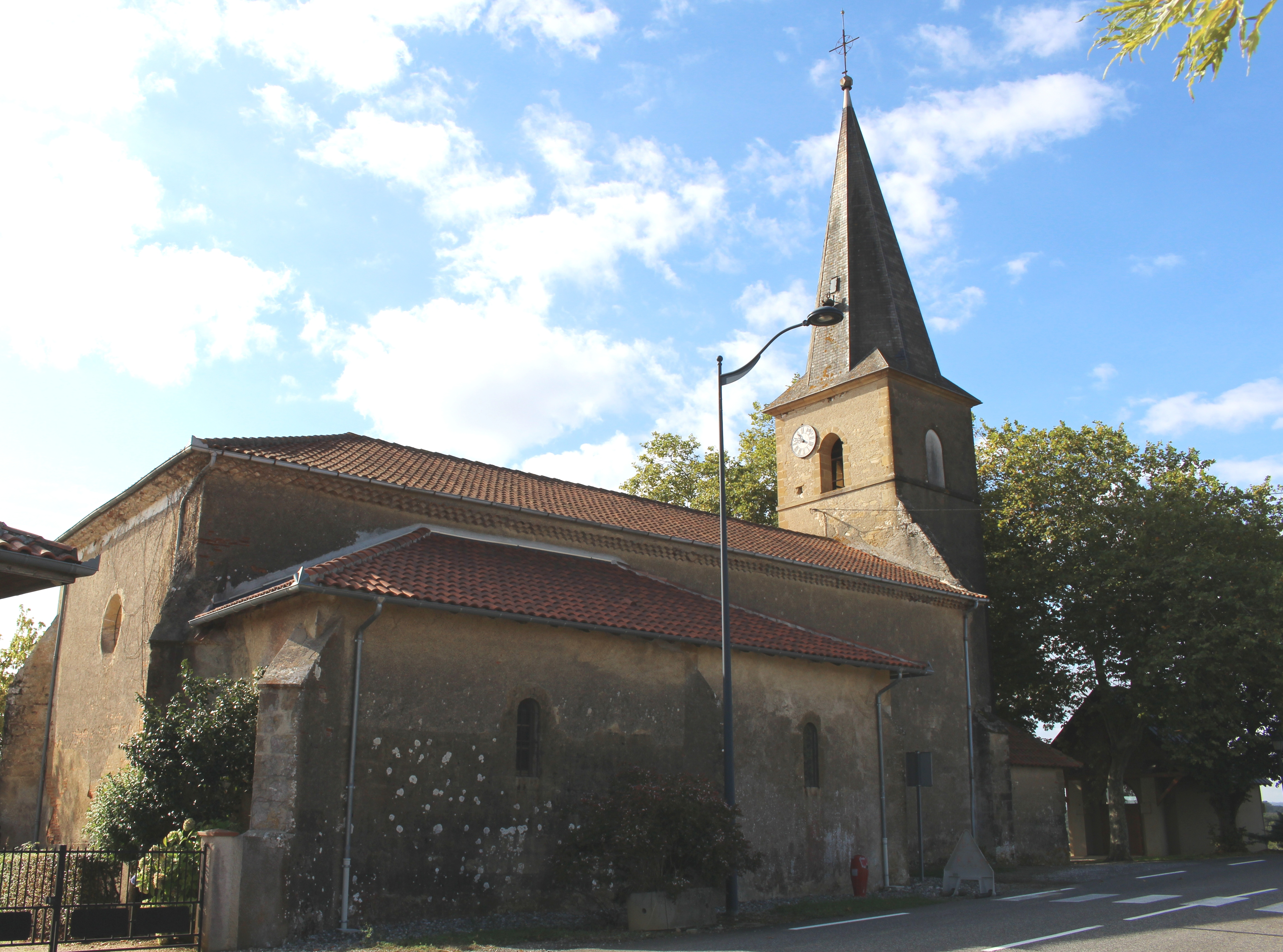 Église Saint-Barthélemy de Thermes-Magnoac (Hautes-Pyrénées)